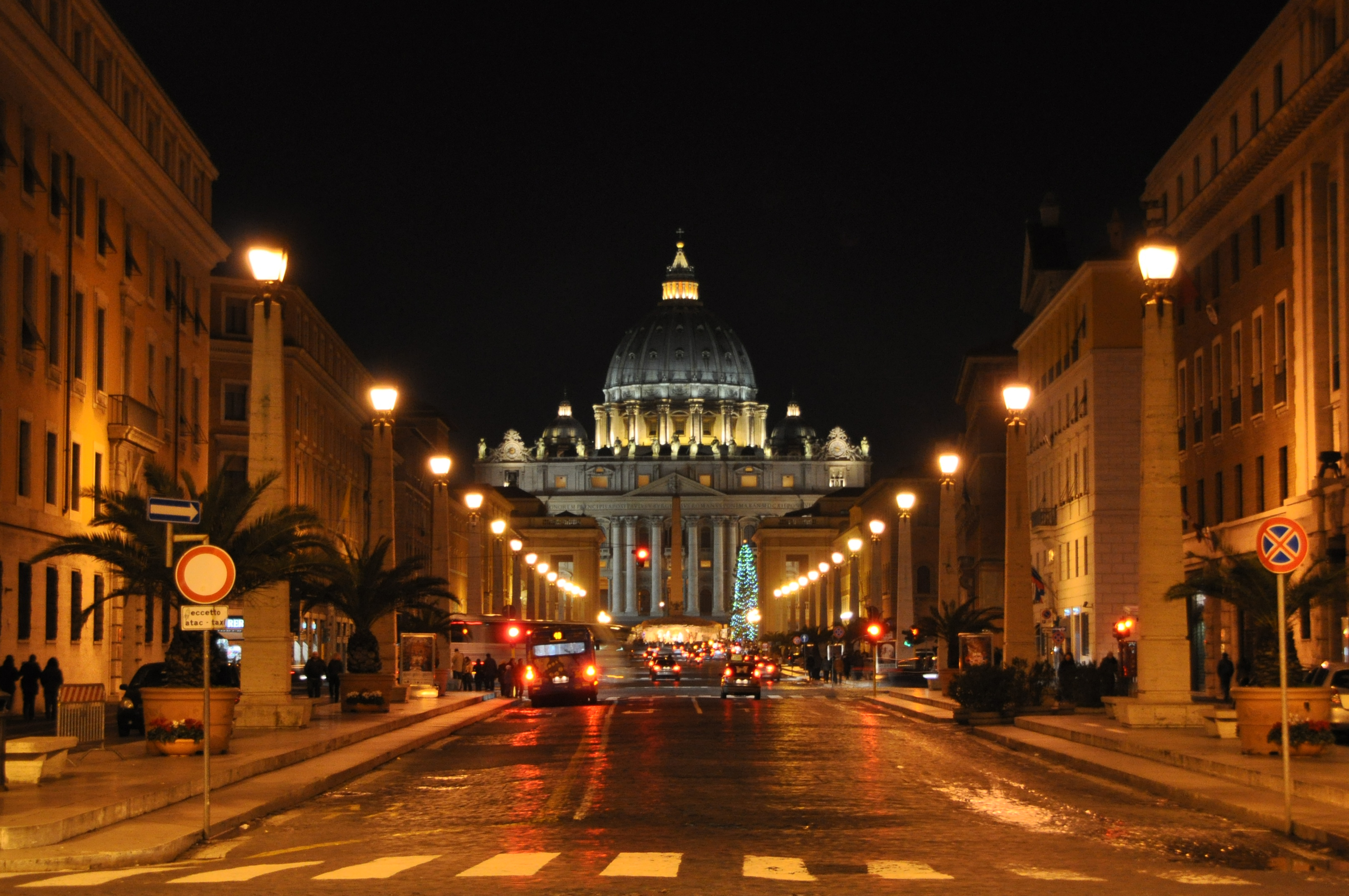 Blick Richtung Petersdom bei Nacht